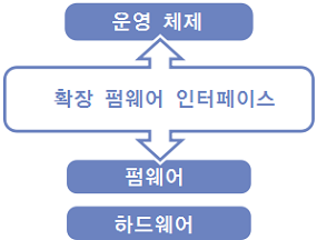 직접 수정한 EFI 그림입니다.